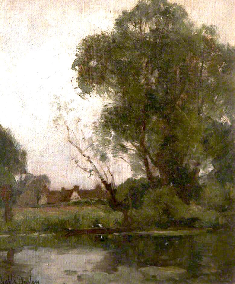 картины английского художника Джона Нобла Барлоу (1861—1917)